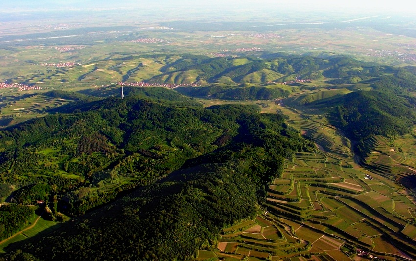 Luftbild vom Kaiserstuhl, aufgenommen aus 1800 Meter.